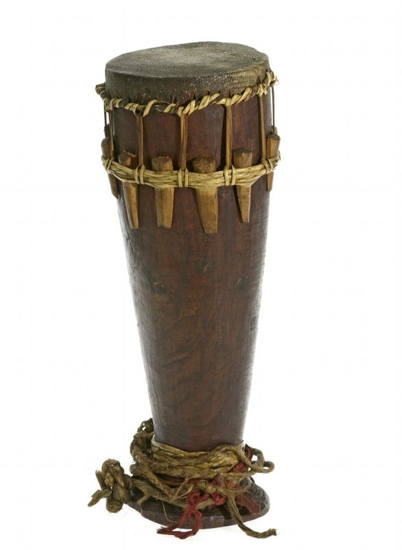 Slaginstrument. Aan de trom is een gevlochten rotanband bevestigd, waarmee de trom om de hals, schuin voor de borst, gehangen kan worden. Op het vel is met kalk een cirkel getrokken, met haakvormige uitsteeksels. De trom wordt met de hand bespeeld.. Enkelvellige conische trom